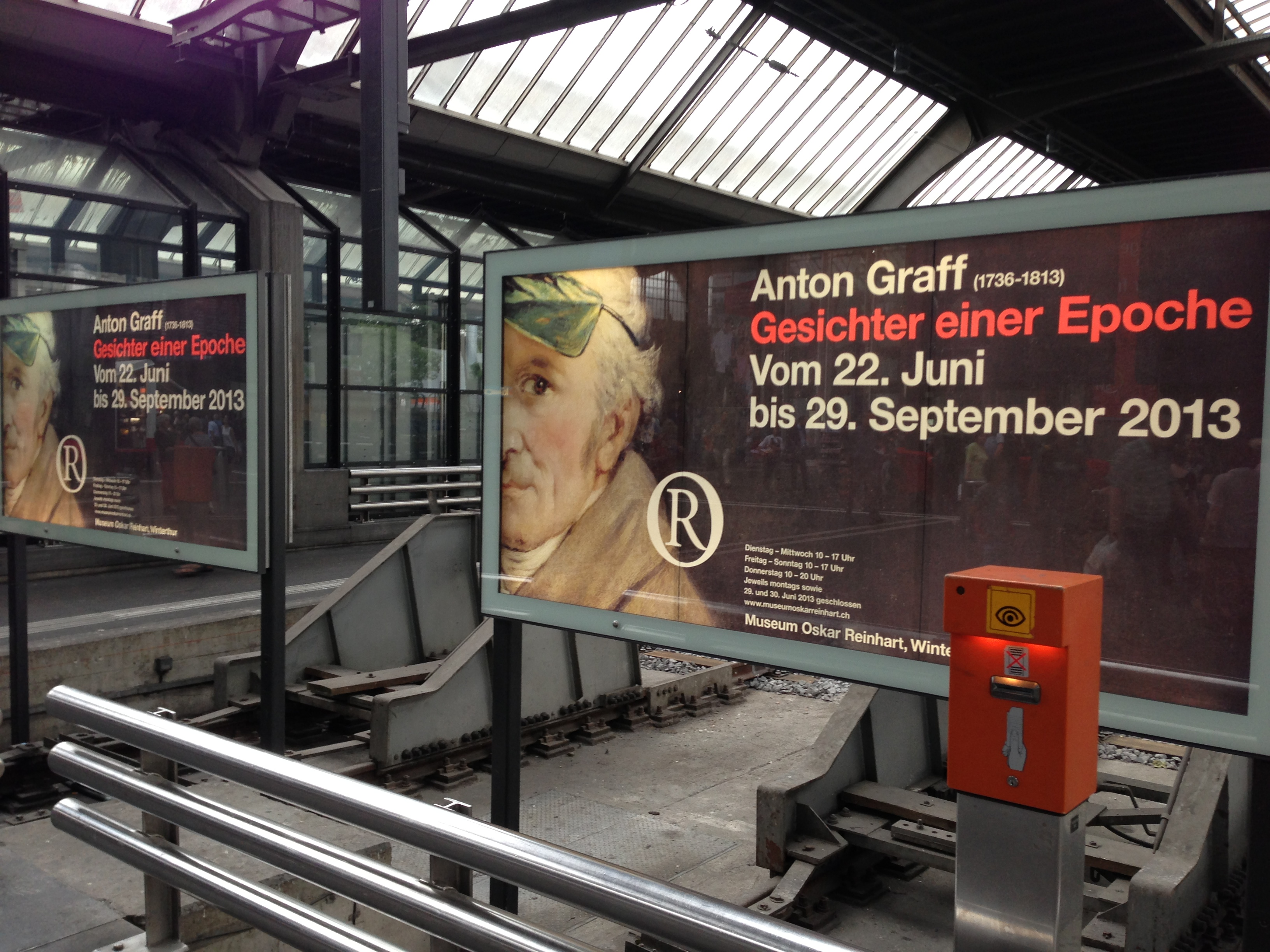 Ausstellungsplakat der Anton Graff Ausstellung 2013 im Museum Oskar Reinhart in Winterthur im Hauptbahnhof Zürich